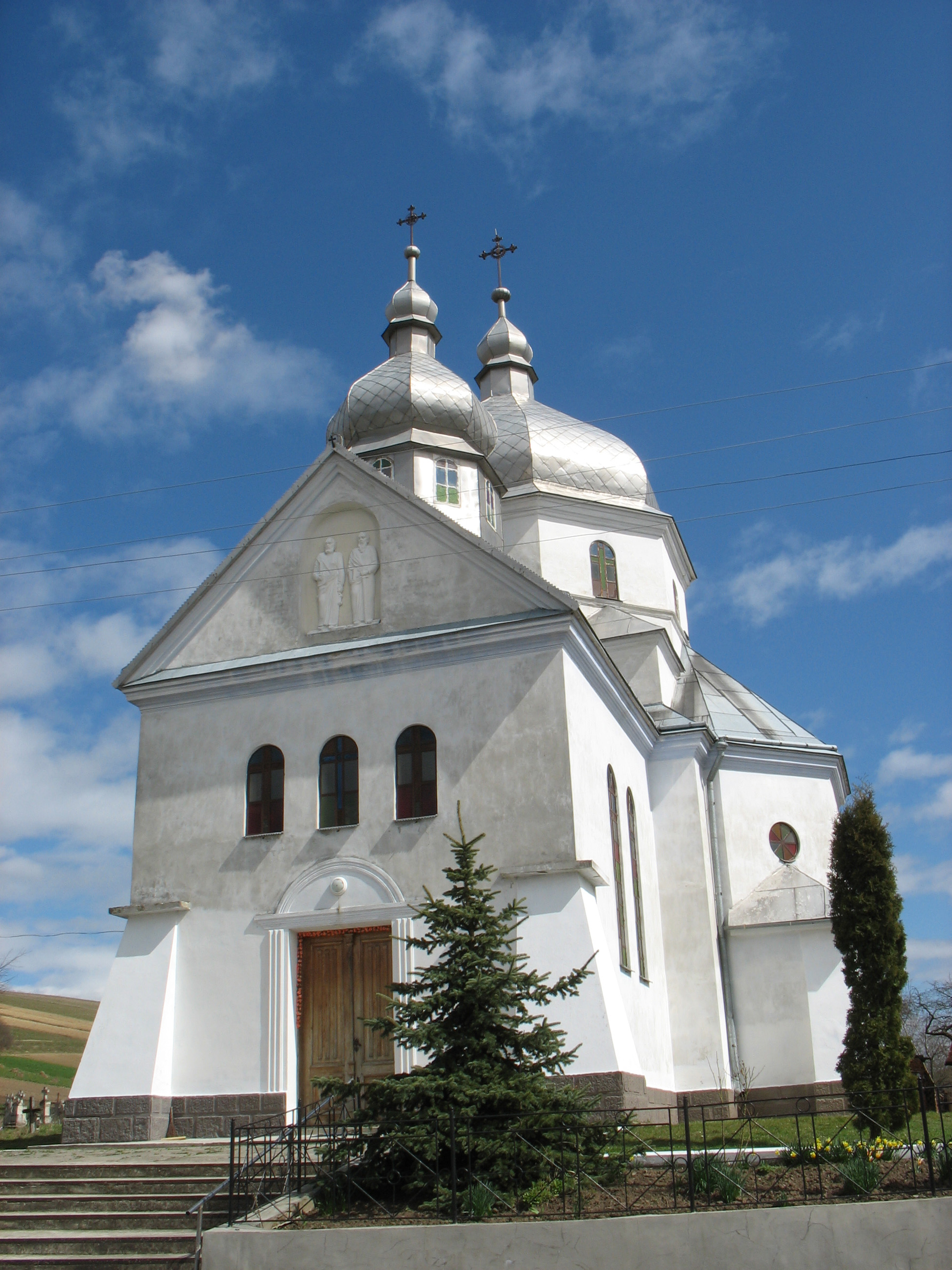 Церква святих верховних апостолів Петра і Павла (мурована) в Урмані Бережанського району Тернопільської області.